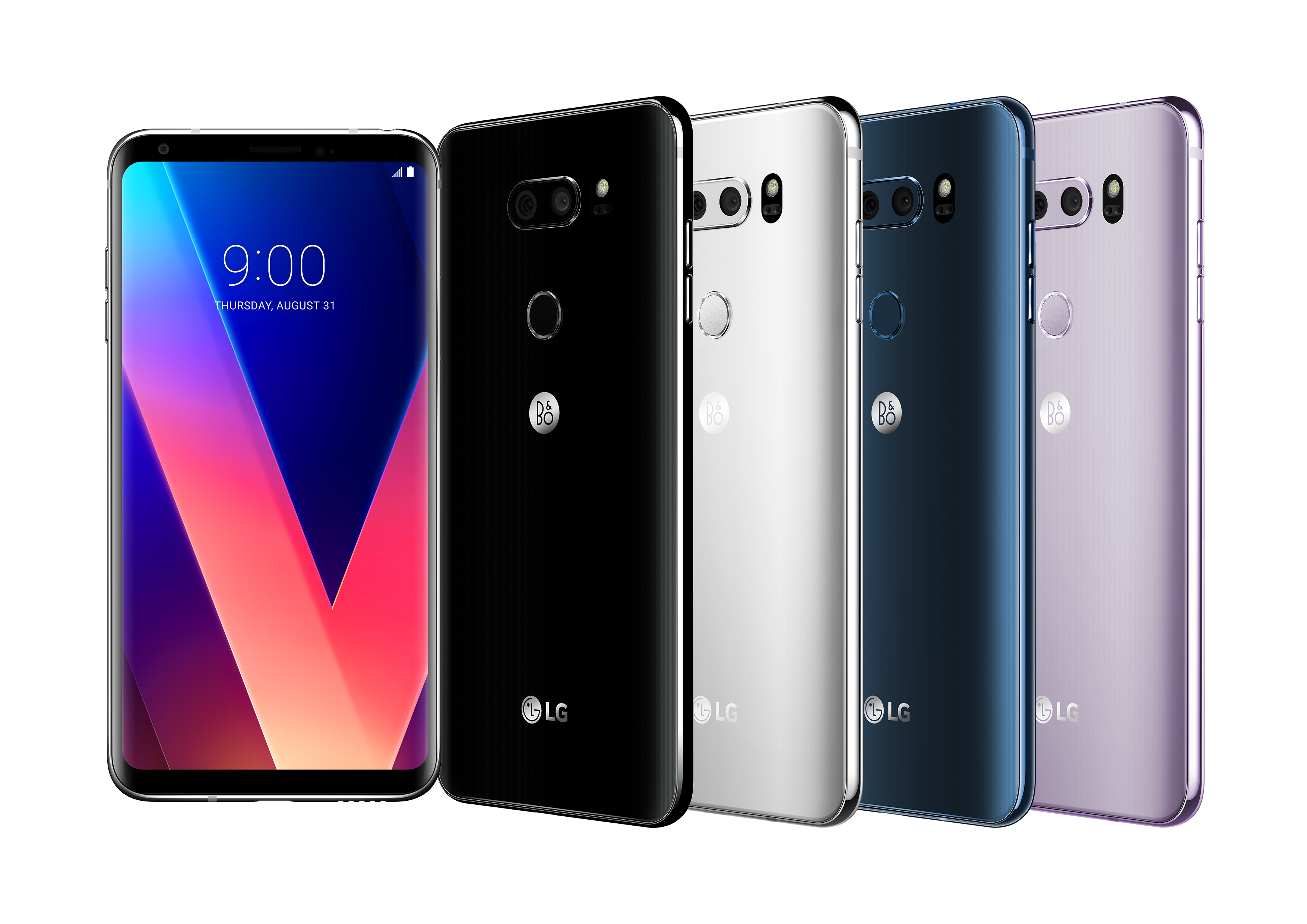 ■ 영화 같은 느낌으로 촬영하는 카메라 성능 강조… 새로운 TV 광고도 21일 동시 공개 ■ LG V30 구매 고객 대상 다양한 혜택 마련 ■ LG V30, 7.3mm의 슬림한 두께와 158g 무게로 ‘패블릿은 크고 무겁다’는 편견 깨 ※ Social LG전자 ( 에서 관련 보도자료를 확인하실 수 있습니다.